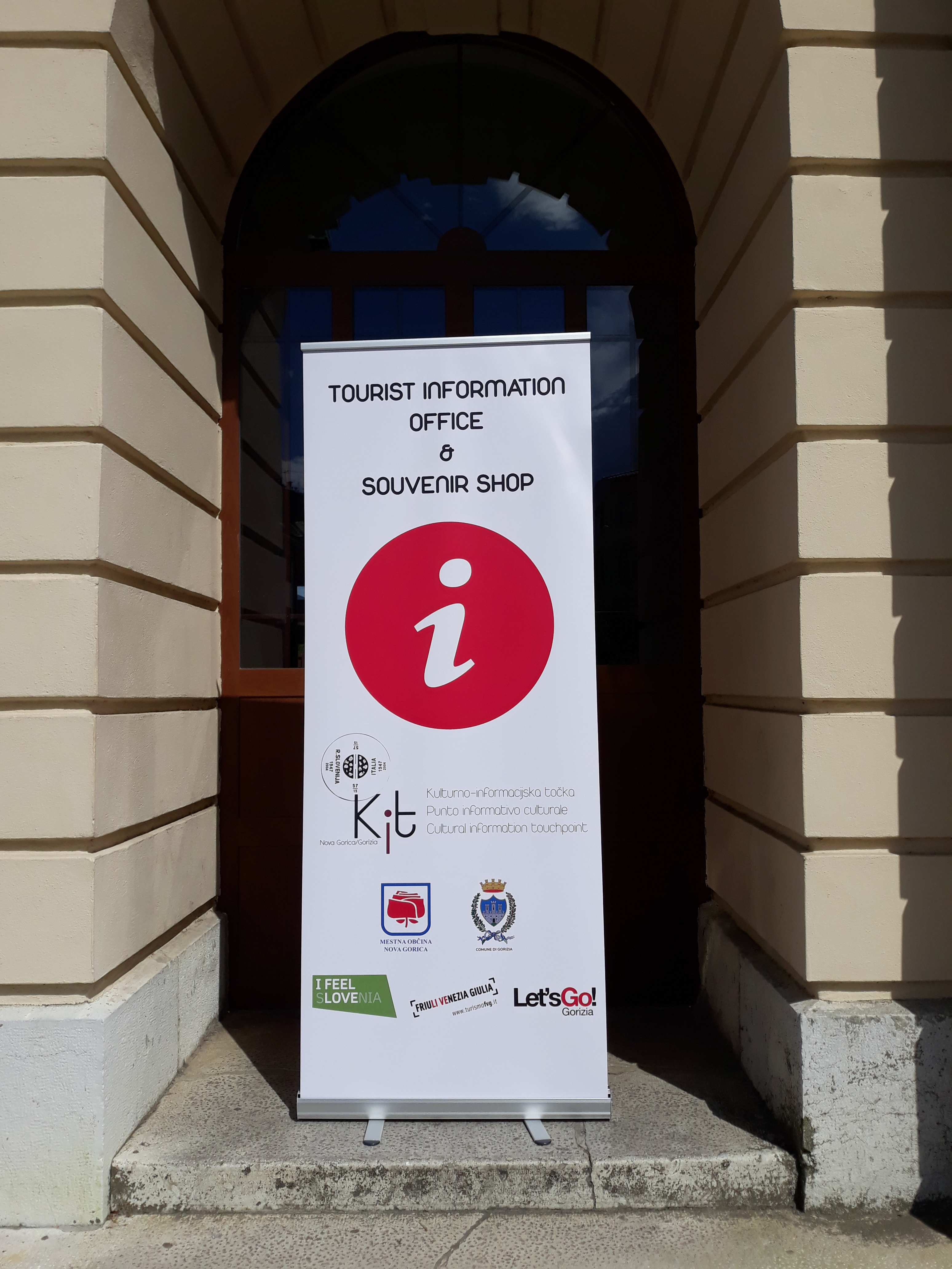 L'ingresso della Stazione dei trenidi Nova Gorica.